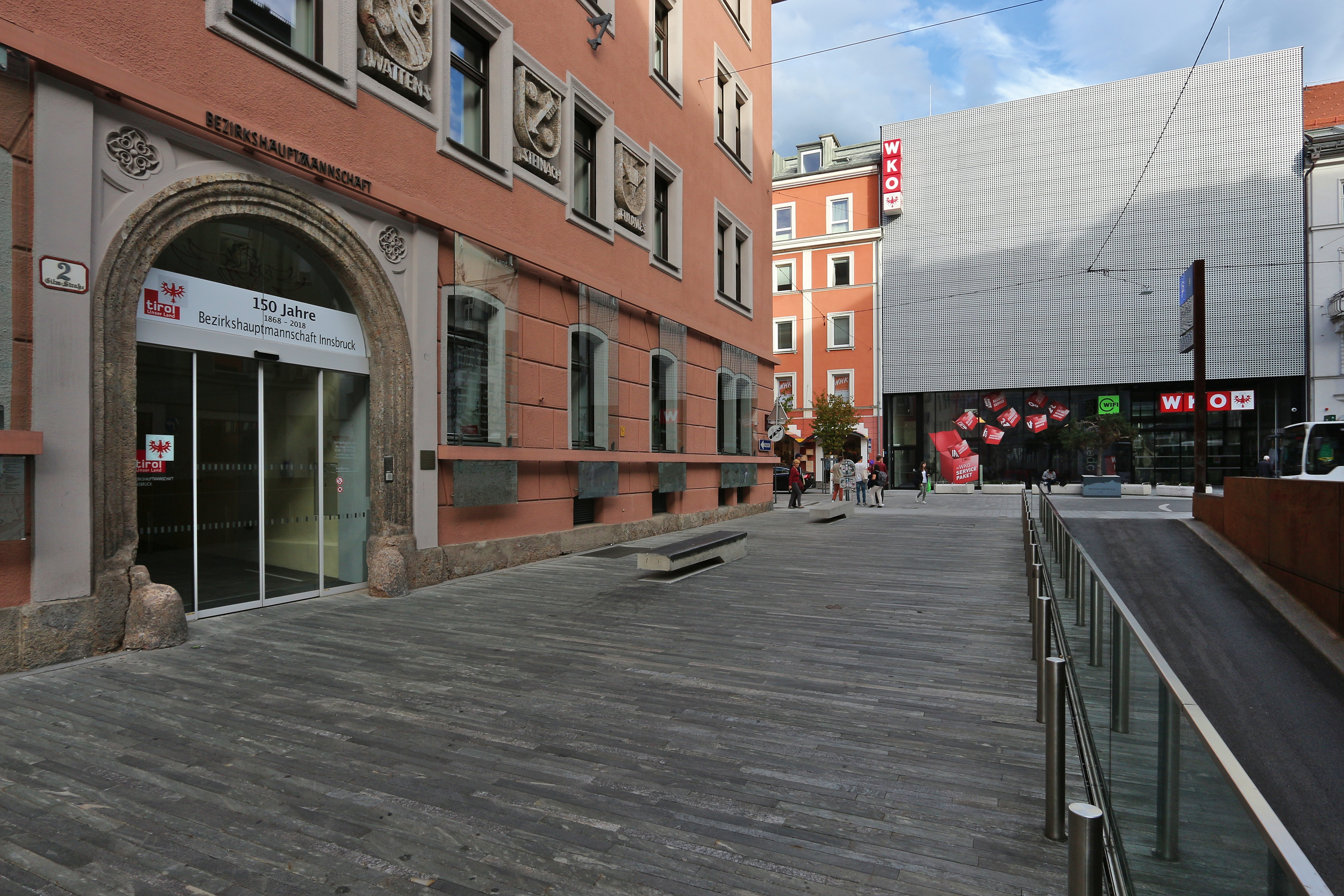 Bezirkshauptmannschaft Innsbruck